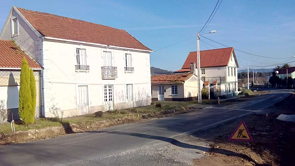 Vista dos Barreiros, Sedes.